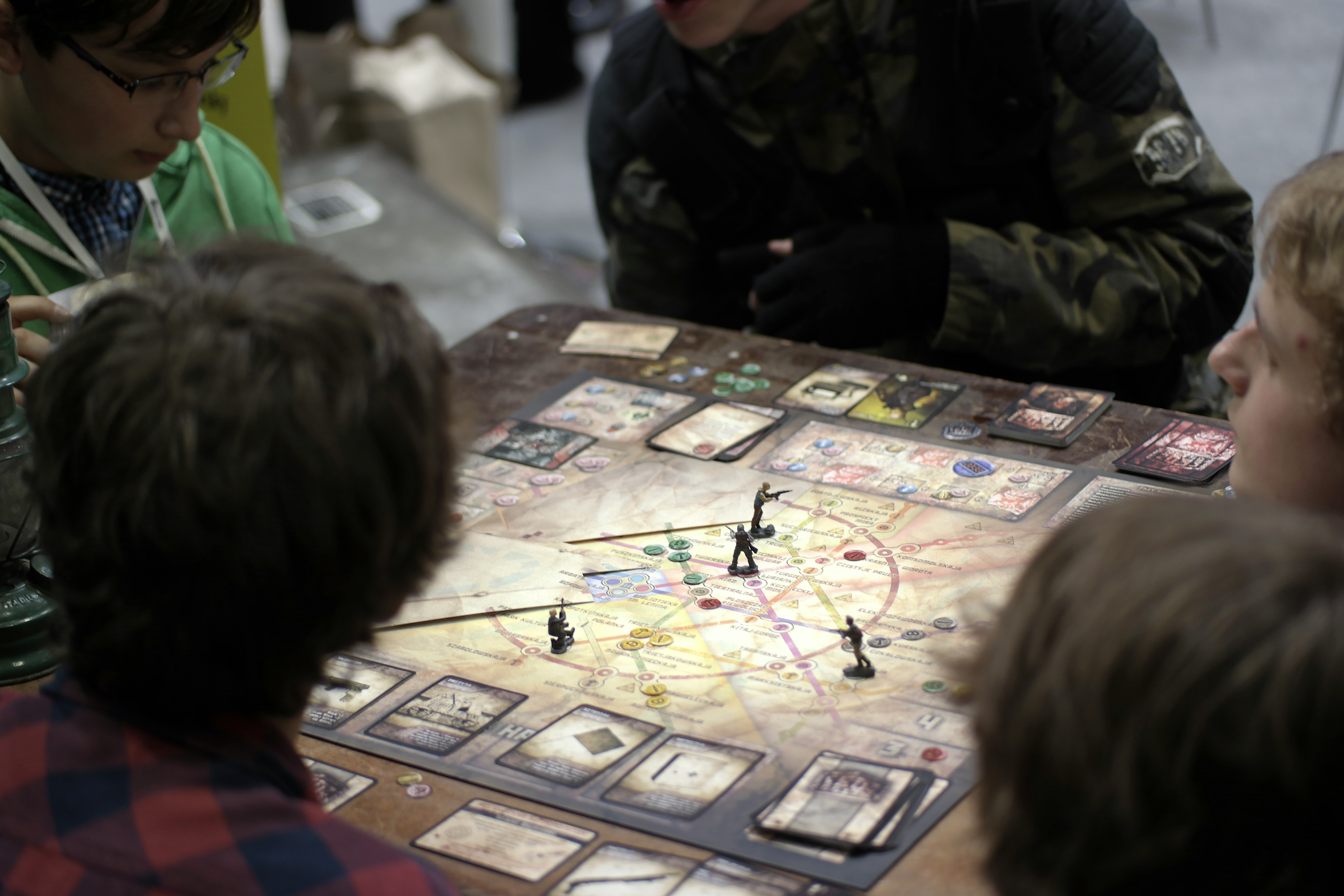 Gra planszowa Metro 2033, Festiwal Fantastyki Pyrkon w Poznaniu